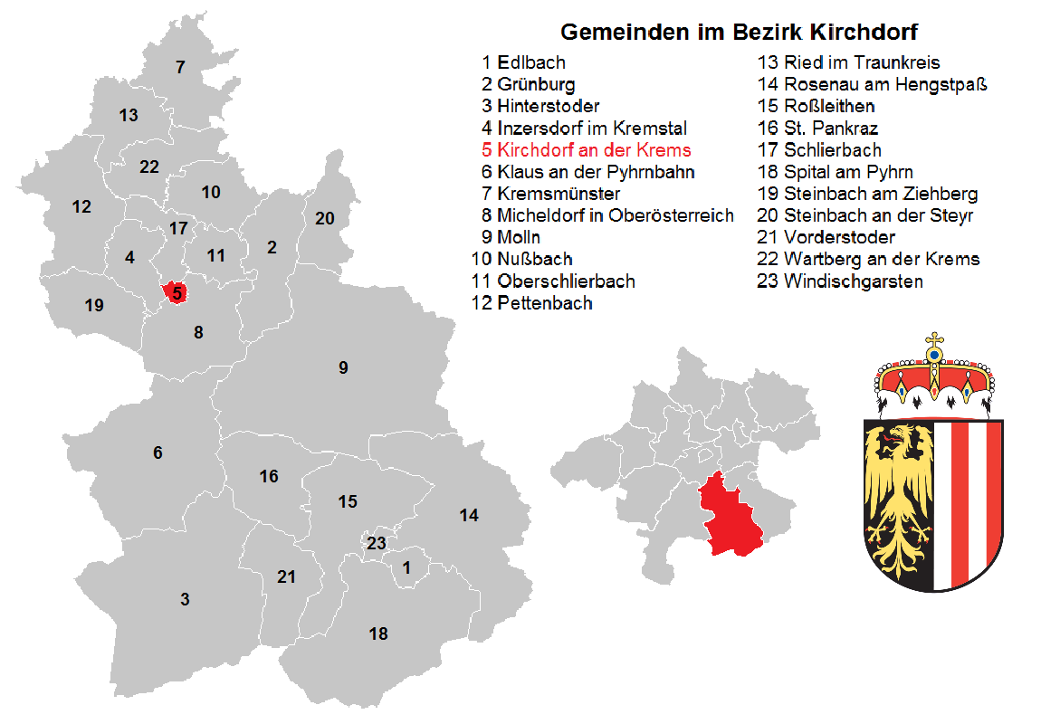 Bezirk Kirchdorf, Oberösterreich